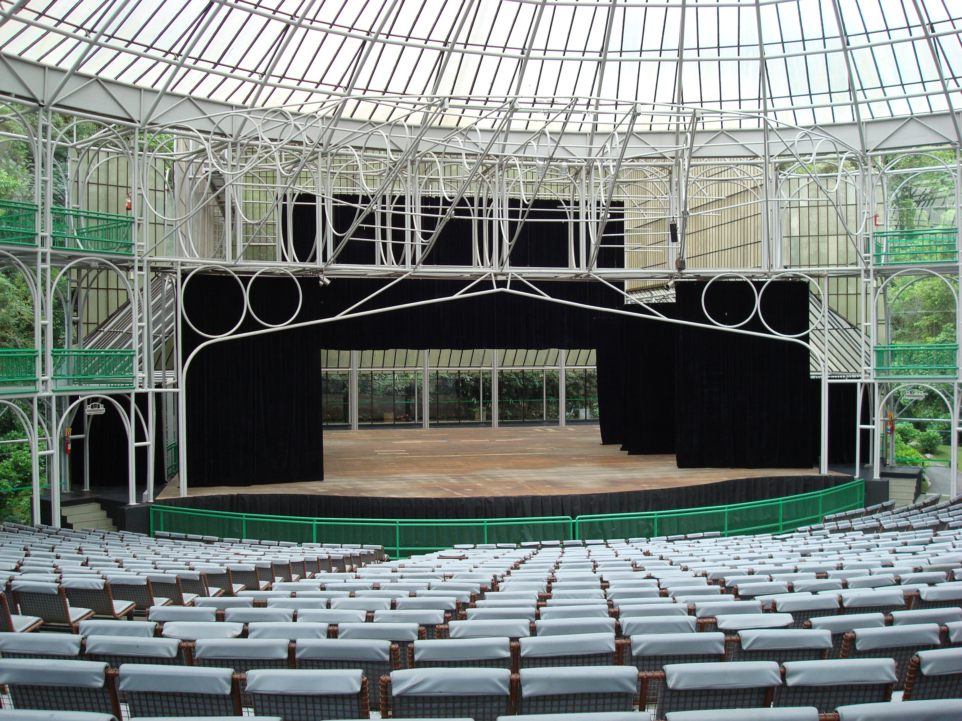 Auditório da Ópera de Arame, Curitiba, Brasil.